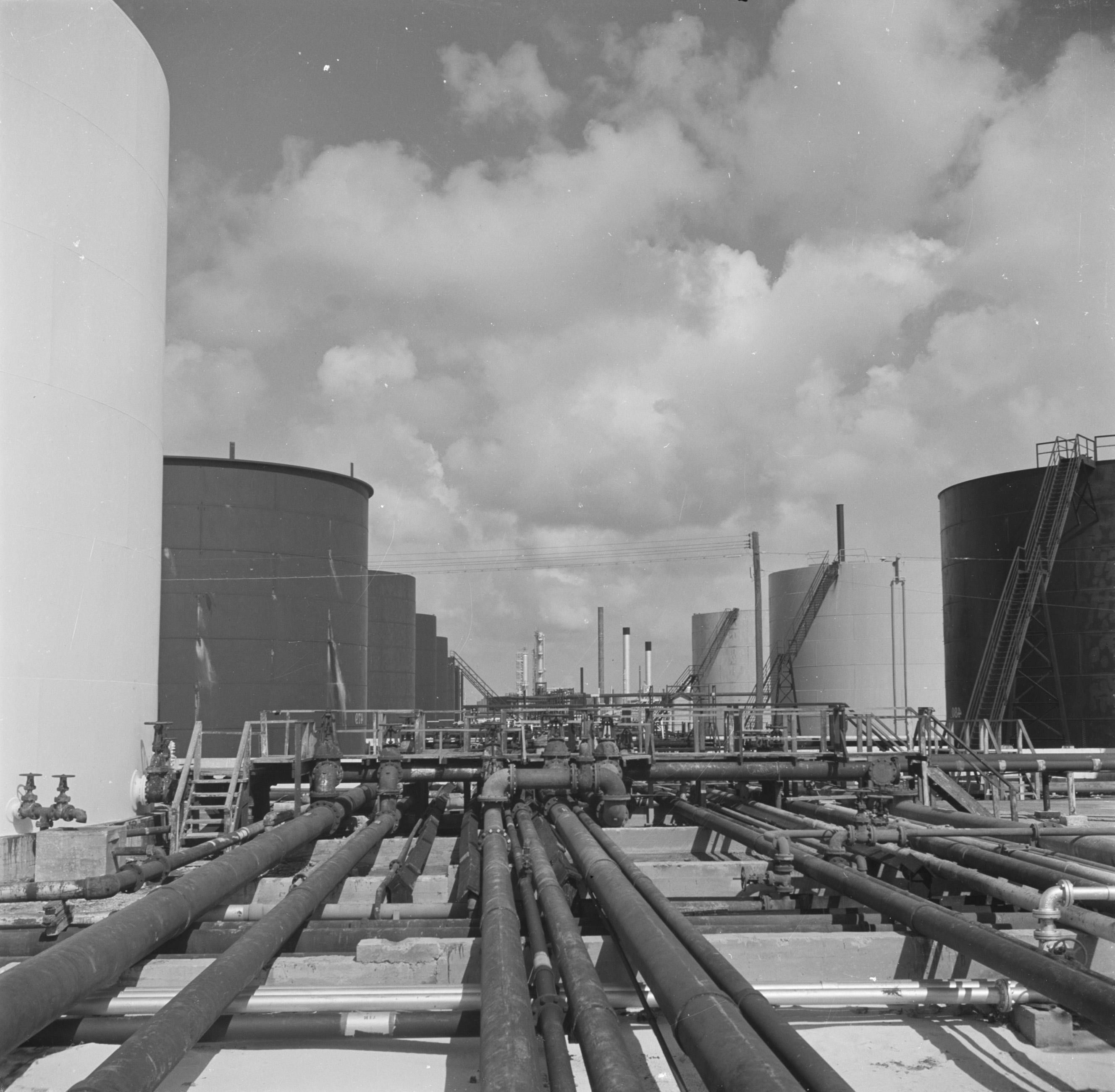 Collectie / Archief : Fotocollectie Van de Poll Reportage / Serie : Reis naar Suriname en de Nederlandse Antillen Beschrijving : De Lago-olieraffinaderij in San Nicolas op Aruba Datum : 1947 Locatie : Aruba, San Nicolas Trefwoorden : raffinaderijen Instellingsnaam : Lago Fotograaf : Poll, Willem van de, [onbekend] Auteursrechthebbende : Nationaal Archief Materiaalsoort : Negatief (zwart/wit) Nummer archiefinventaris : bekijk toegang 2.24.14.02 Bestanddeelnummer : 252-8047